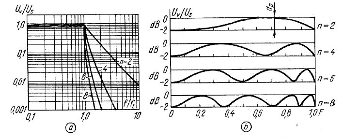 Tšebõšovi filtri sagedustunnusjooned (a) ja sumbumuse muutumine pääsualas, kui lainjus ap on 2 dB (b)